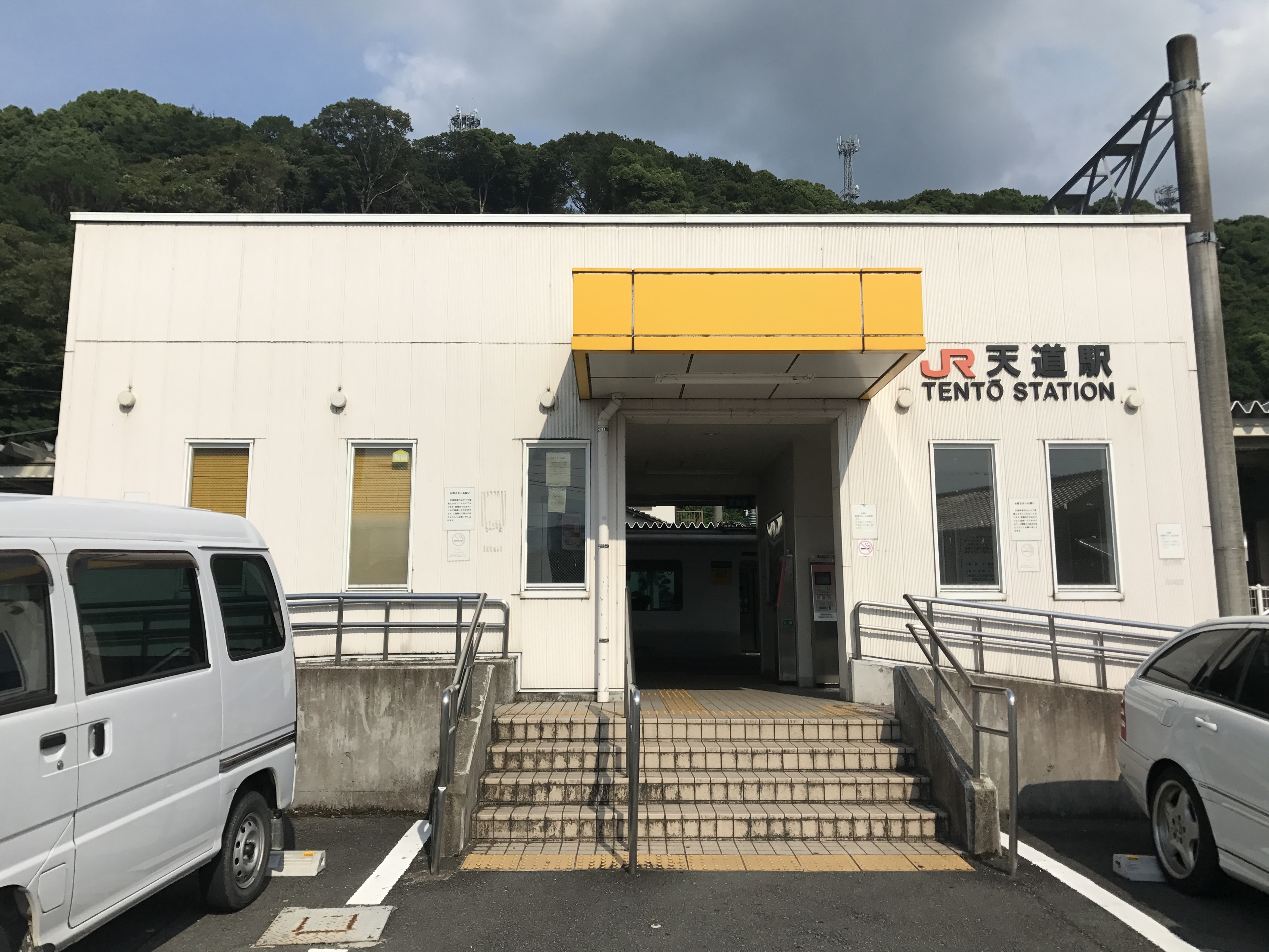 天道駅駅舎